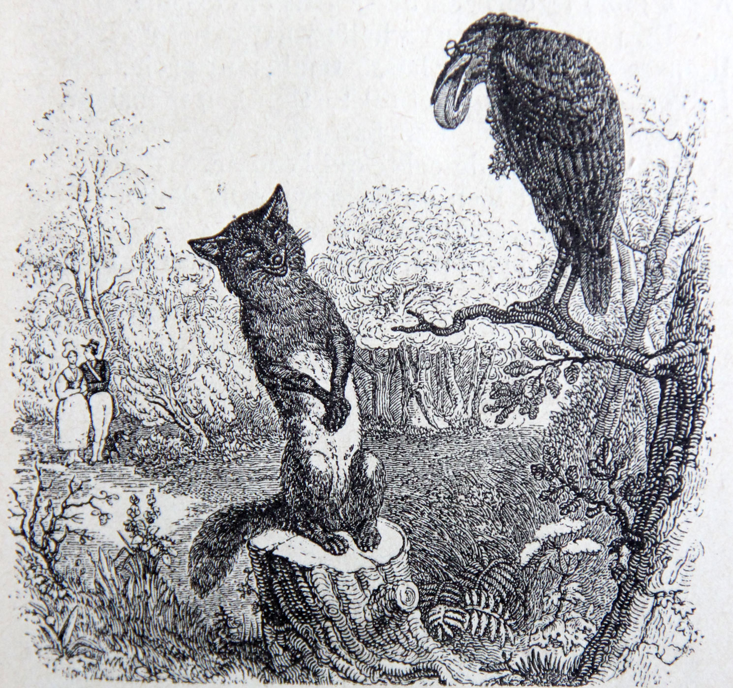 J.J. Grandville. Illustrations des Fables de La Fontaine. 1838-1840.